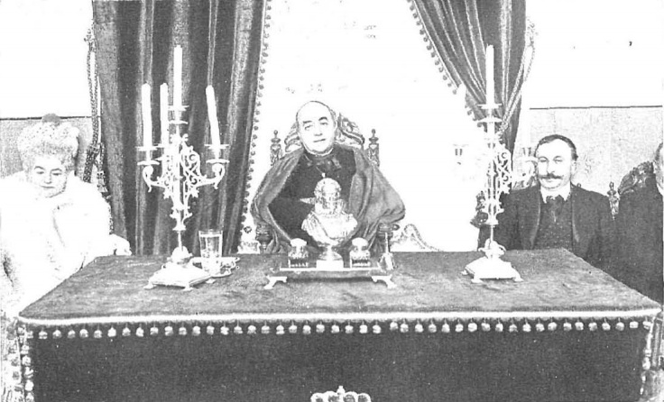 Emilia Pardo Bazán, Cardenal Herrera, y Eduardo Vincenti. Fotografía de Manuel Compañy.